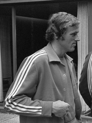 Harry Vos.